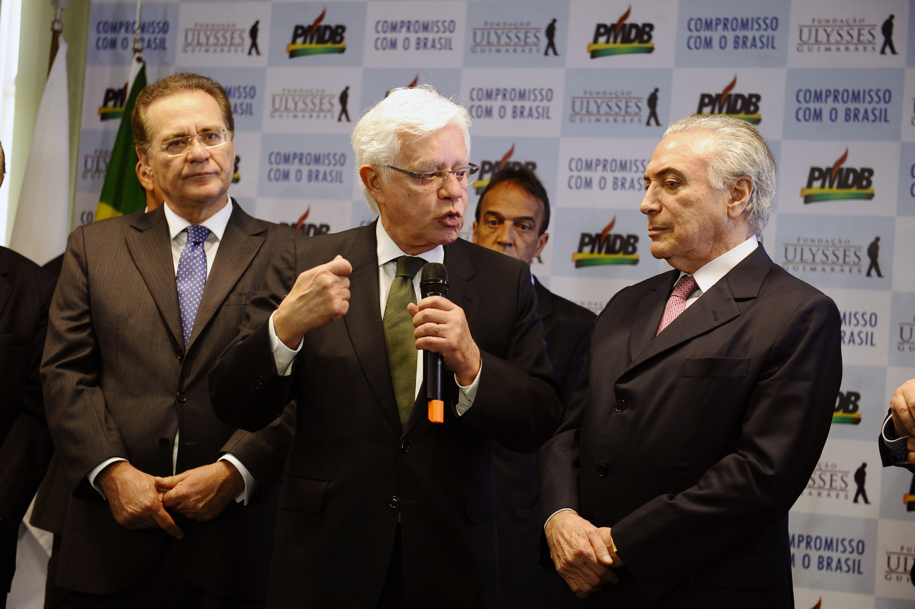 Fundação Ulysses Guimarães - Apresentação das mídias digitais do PMDB E/D: presidente do Senado Federal, senador Renan Calheiros (PMDB-AL); presidente da Fundação Ulysses Guimarães, Moreira Franco-pronunciamento; vice- presidente da República, Michel Temer. Foto: Marcos Oliveira /Agência Senado